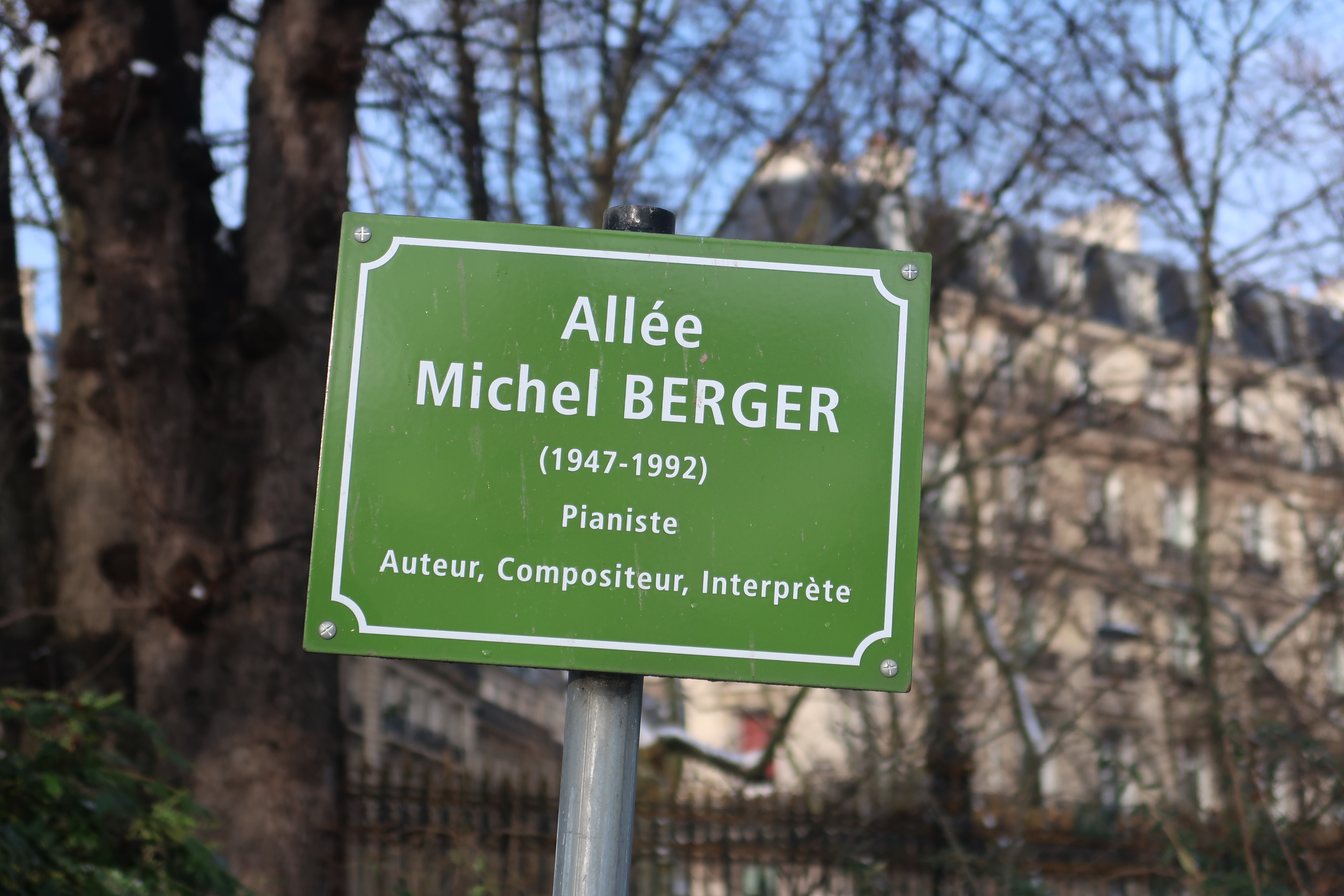 Plaque de l'allée Michel-Berger dans le parc Monceau (Paris, 8e).